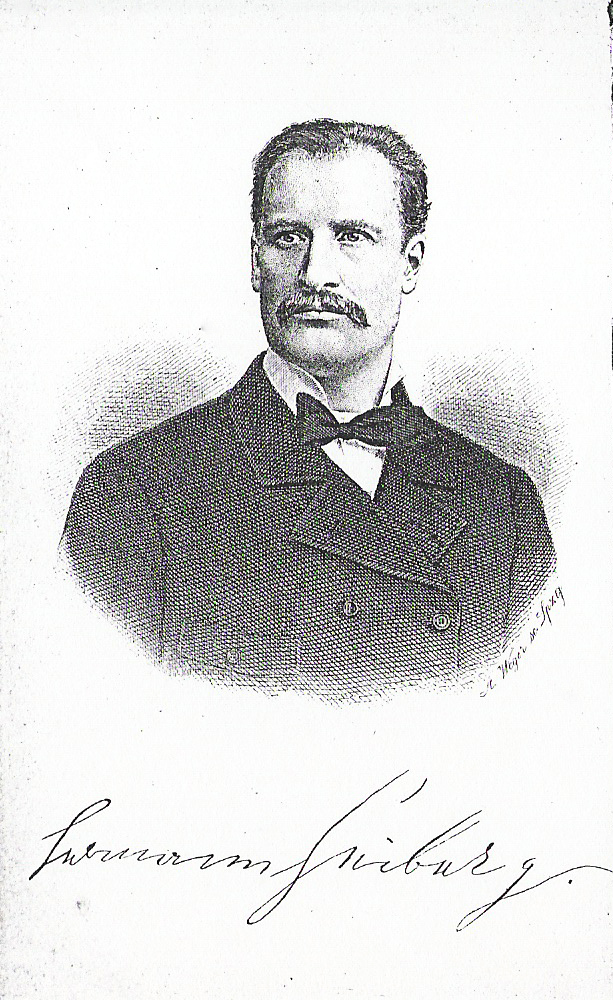 Hermann Heiberg (1840-1910). Bildnis in Kürschners Deutschem Literaturkalender auf das Jahr 1886. Das Bild ist gemeinfrei. Eingebracht am 24. November 2006 von Benutzer Goerdten